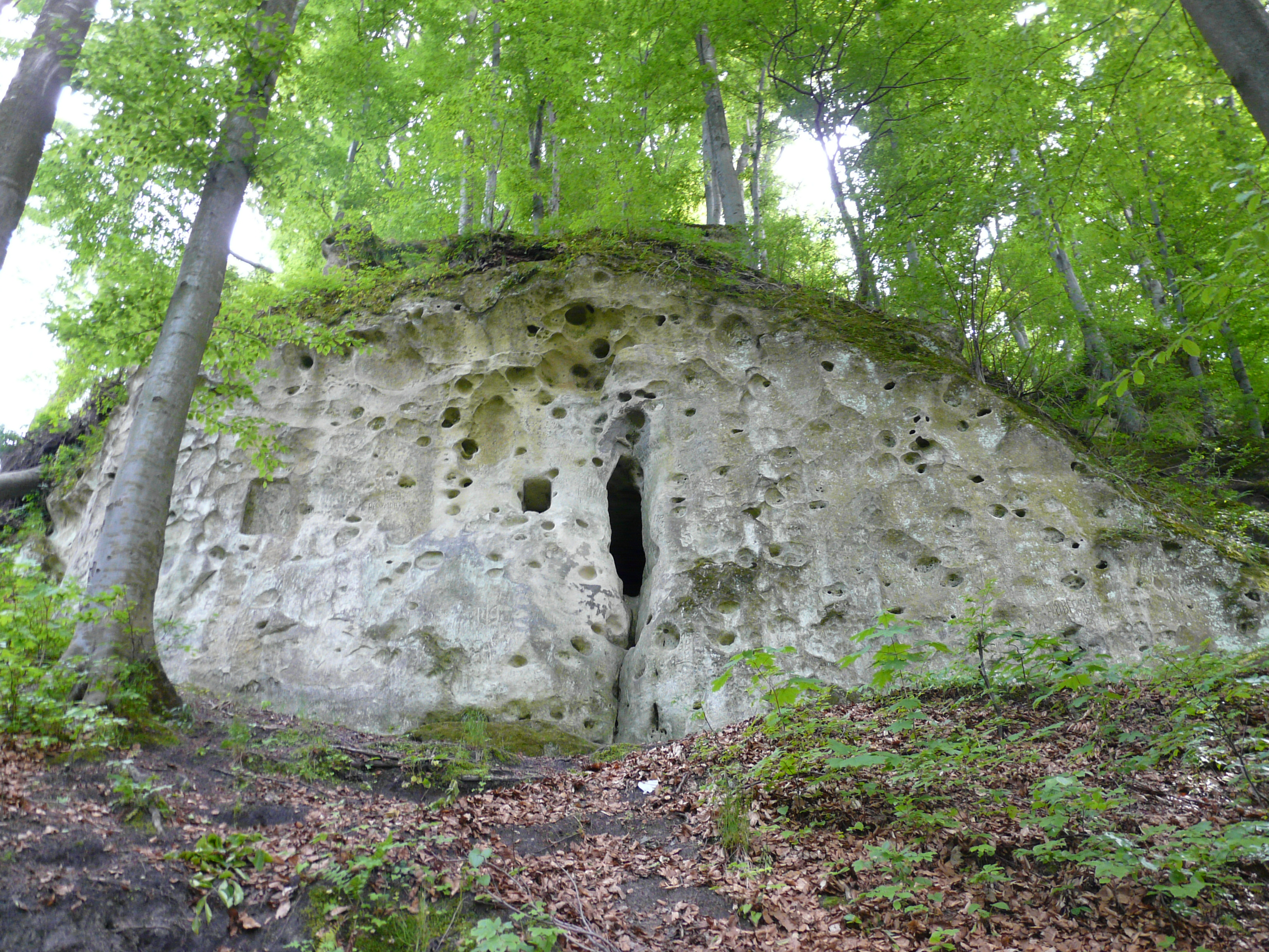 Ілів